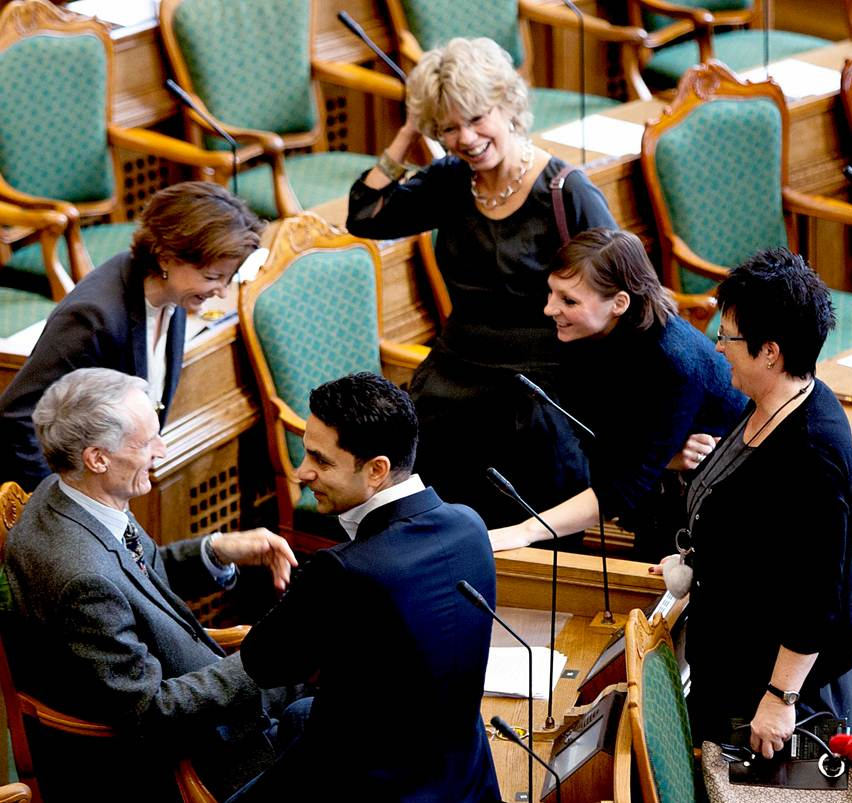 Efter grænsehindringsdebat i Folketinget. Manu Sareen, Karen Ellemann (V), Bertel Haarder (V), Anne Baastrup